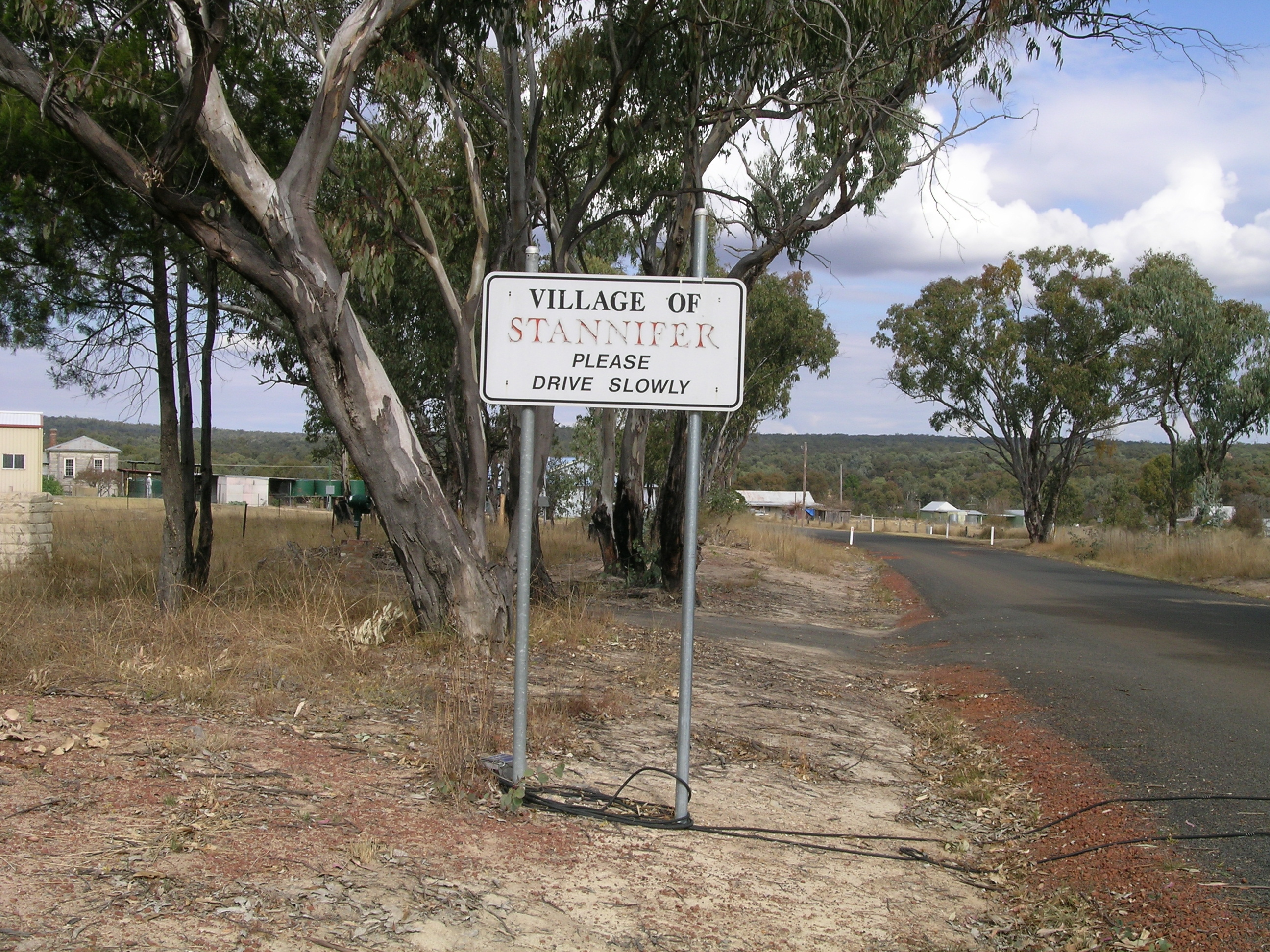 Stannifer, NSW